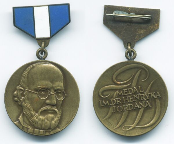 Medal im. dr. Henryka Jordana, wersja na zawieszce (odznaczenie Jana Wójcika).